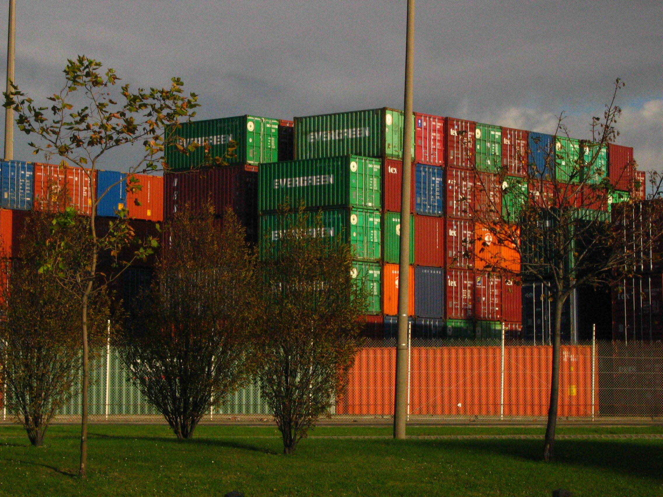 Conteneurs sur le port du Havre, Le Havre ; source : photographie personnelle de l'Utilisateur Urban, prise en octobre 2004.